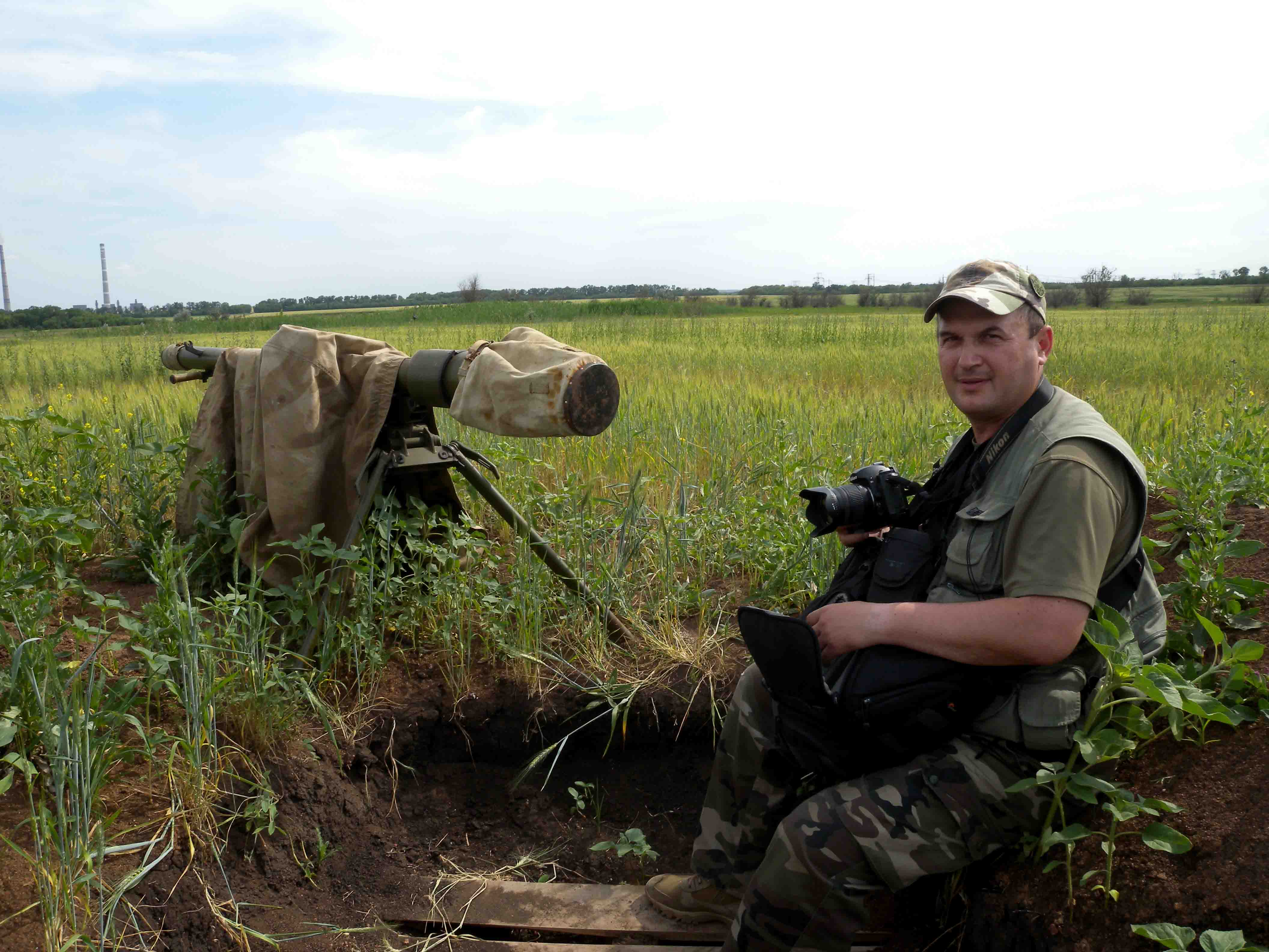 “Схід та Захід єдині”. Ігор Крочак.